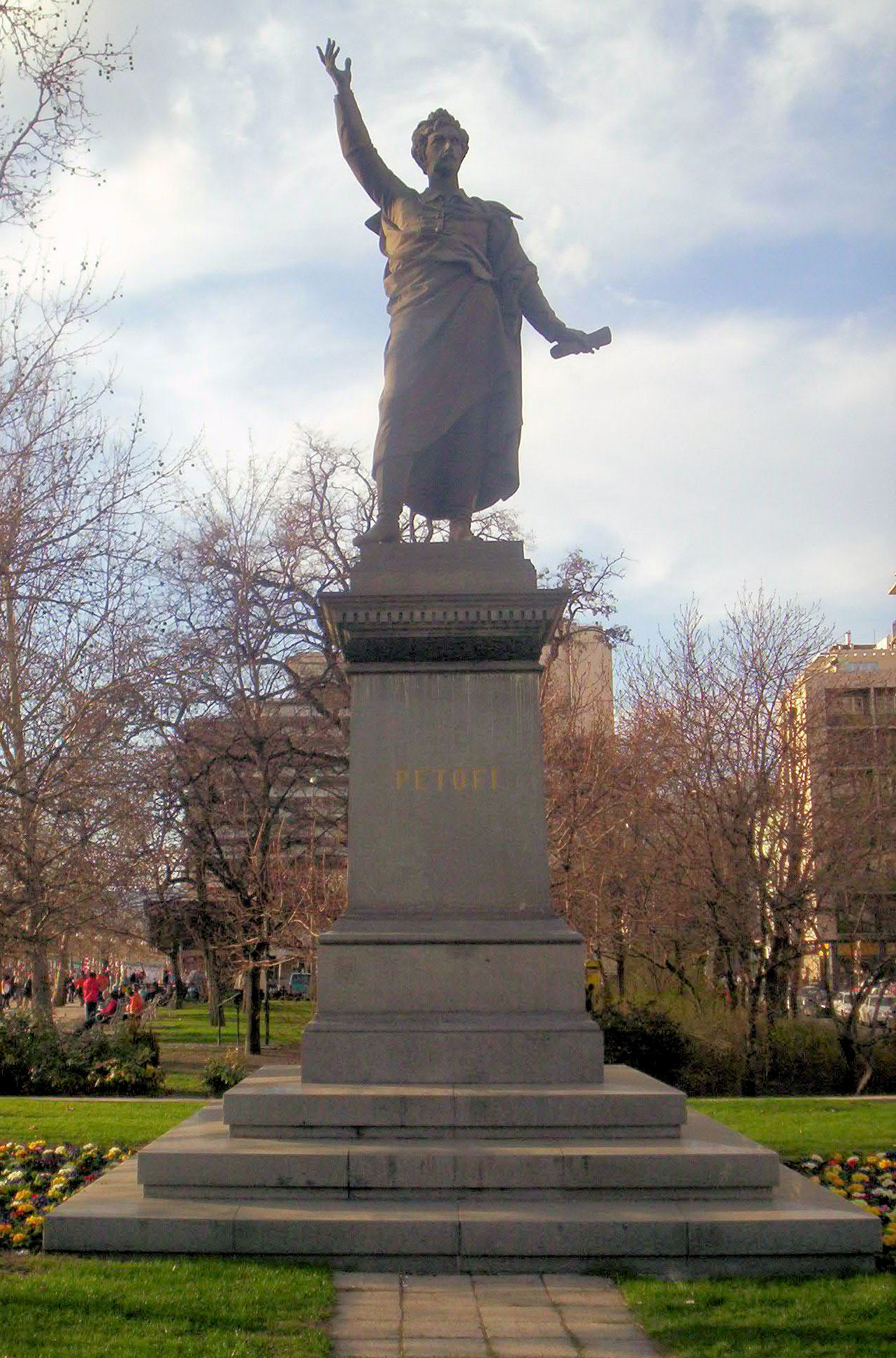 Petőfi Sándor szobra Budapesten ; Izsó Miklós és Huszár Adolf alkotása – – photo taken by uploader User:Csanády